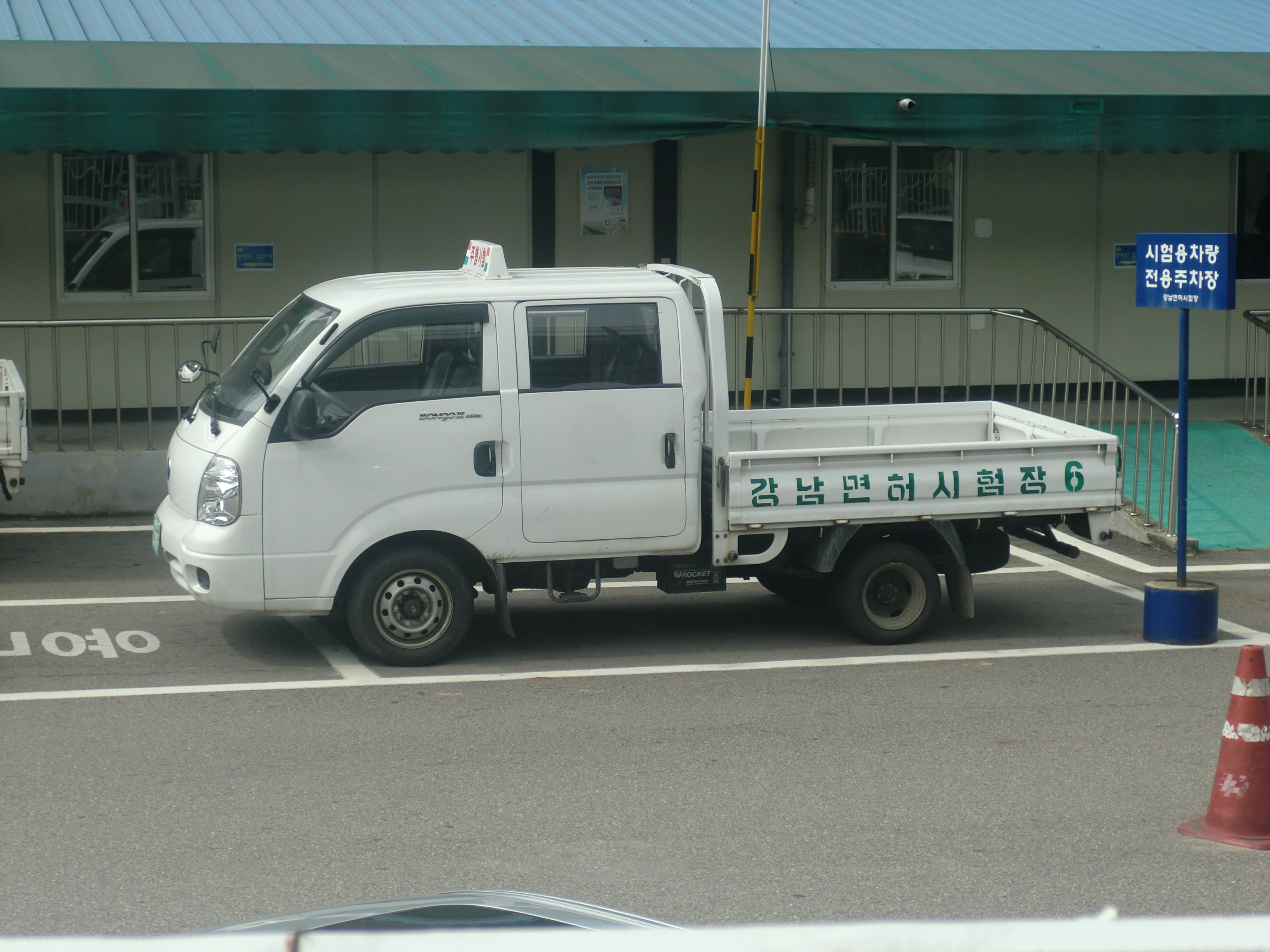 강남운전면허시험장의 기아 봉고3 도로주행용